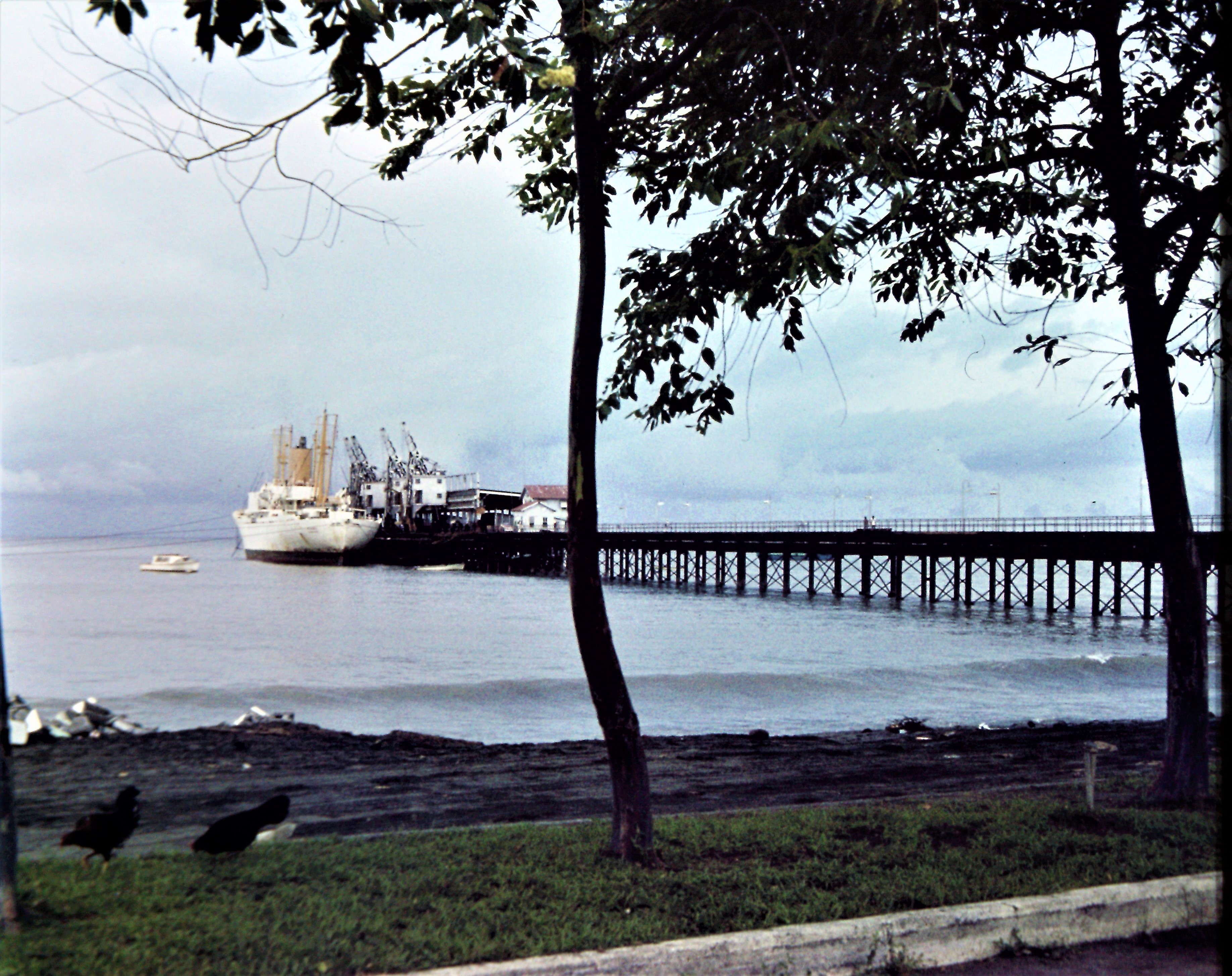 Réfrigérateur MV Pekari de la société allemande F. Laeisz sur la jetée de Puerto Armuelles, Panama - 1976